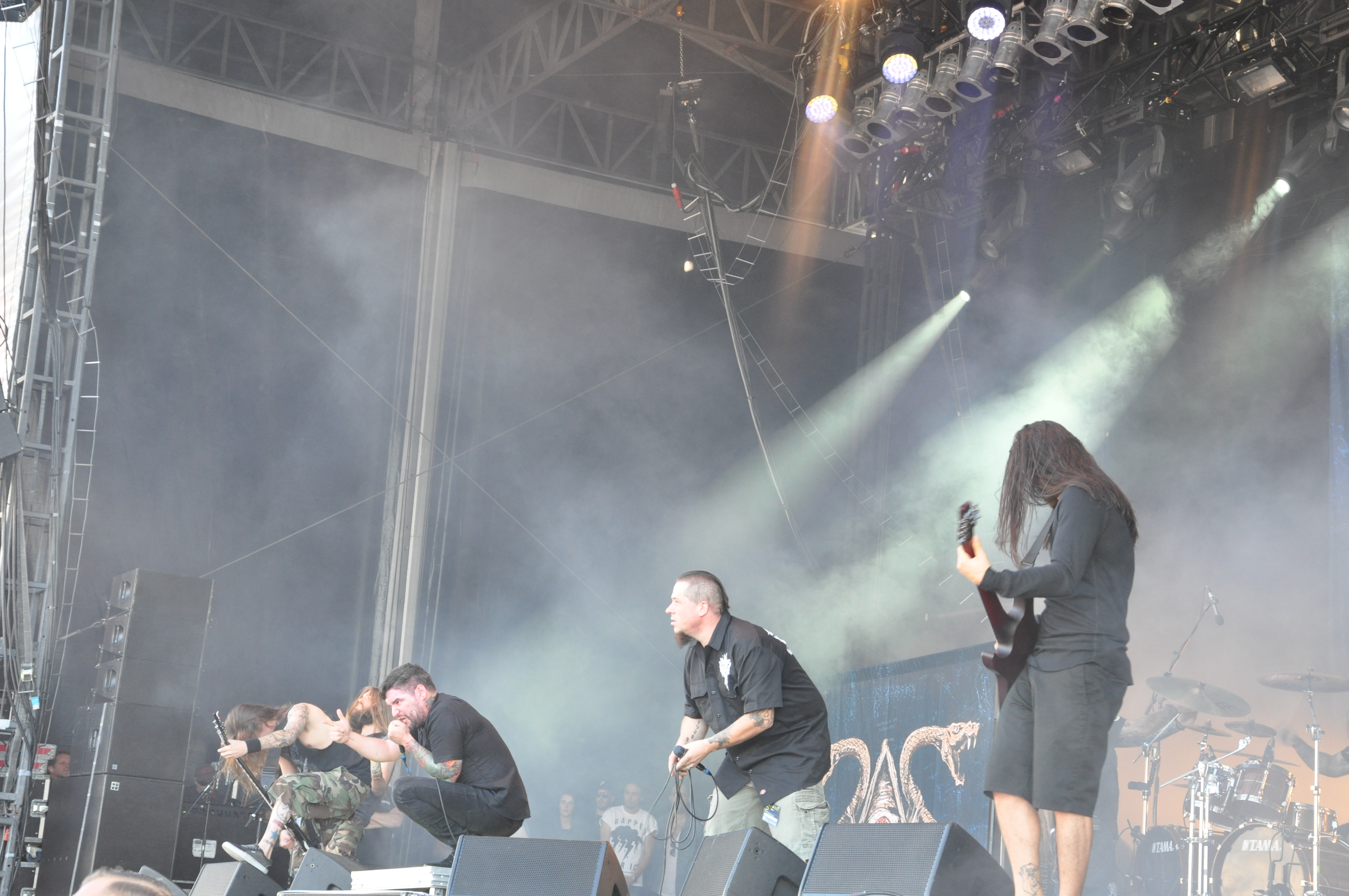 Suicide Silence auf der Clubstage bei Rock am Ring 2014